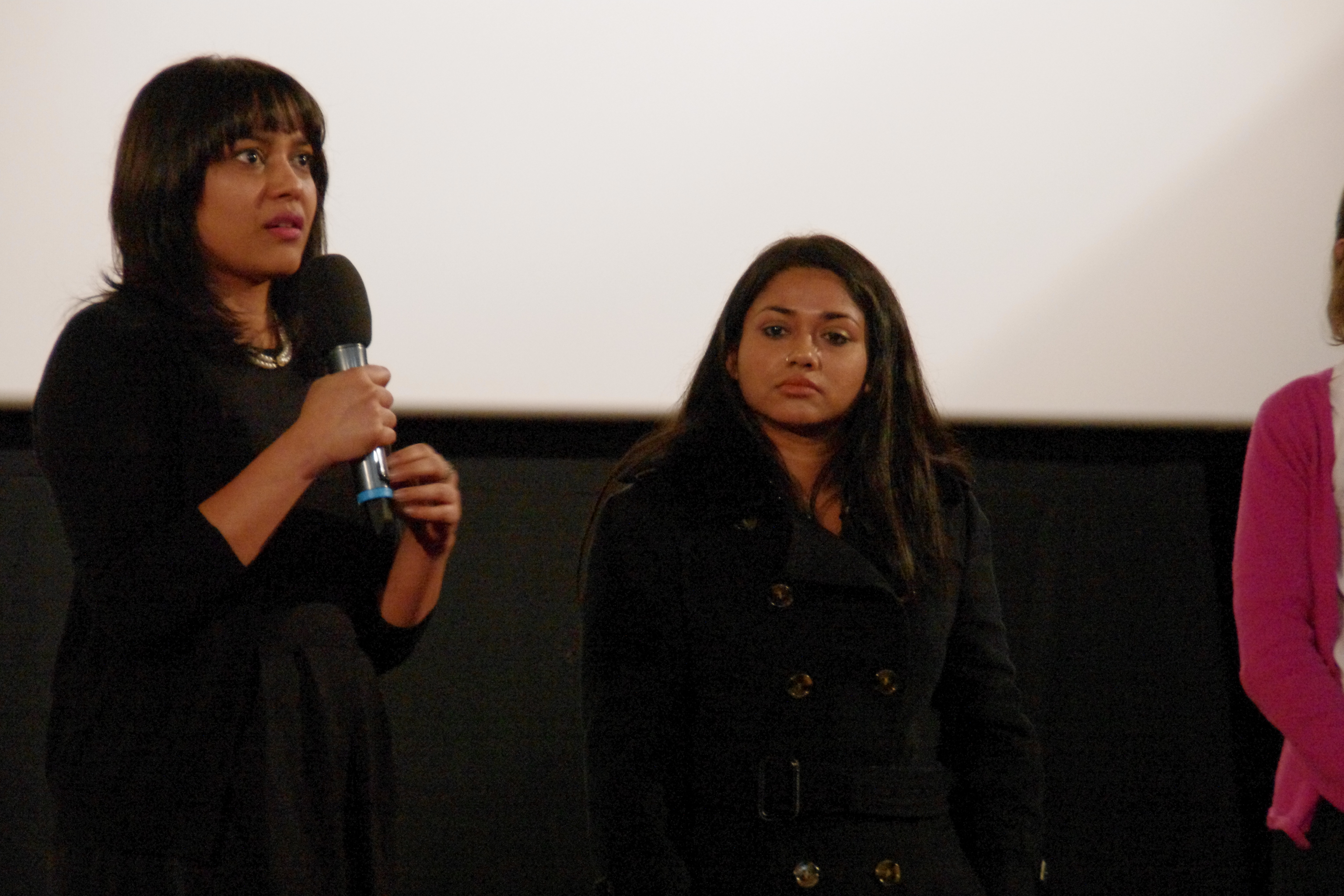 Shahana Goswami (Actress) with Rubayat Hossain (producer and Director) - Under Construction - Festival des Cinémas d'Asie - Vesoul 2016